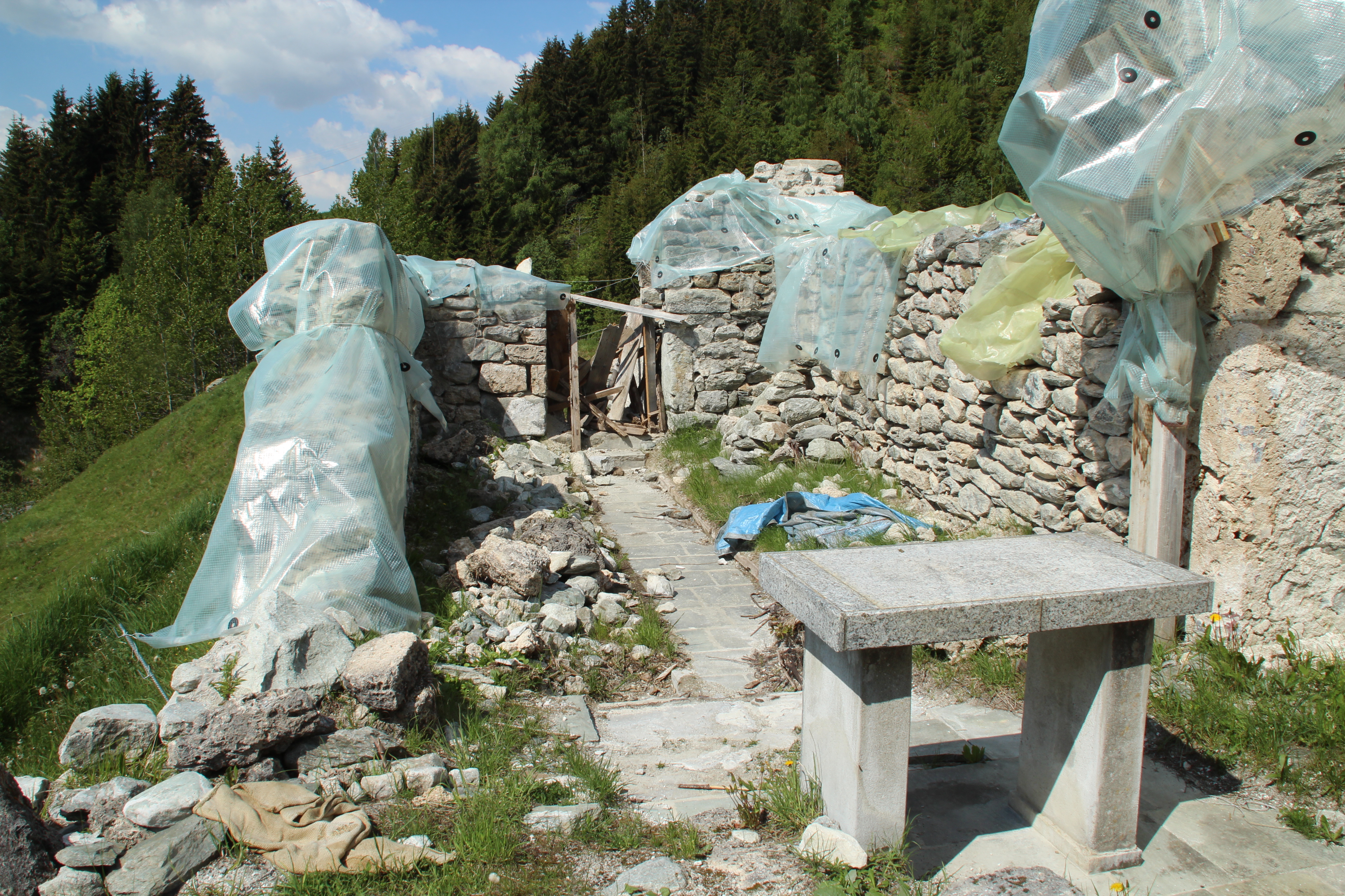 Ruine Caplutta Sogn Benedetg Blick zum Eingang